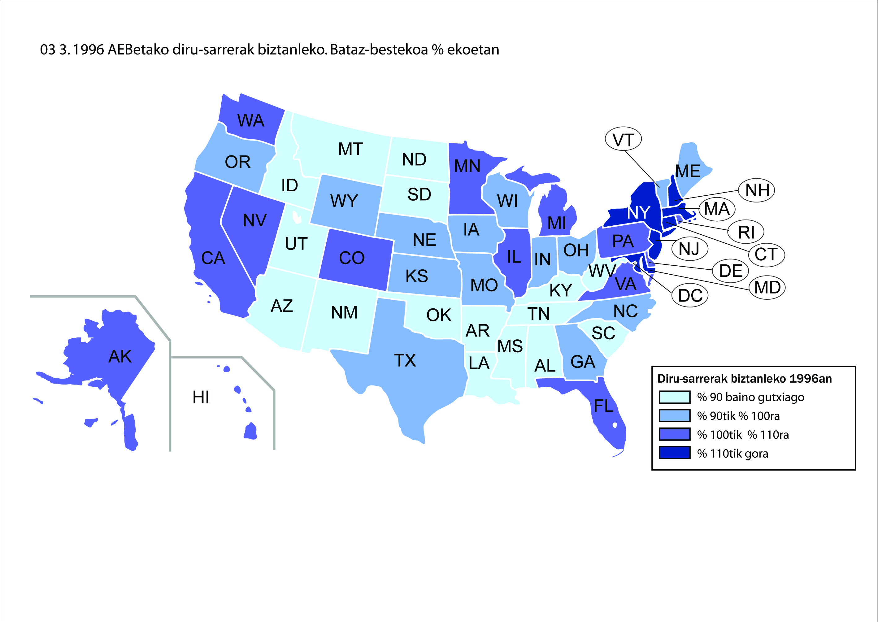 1996 AEBko diru sarrerak biztanleko, UEUko liburutik hartua.